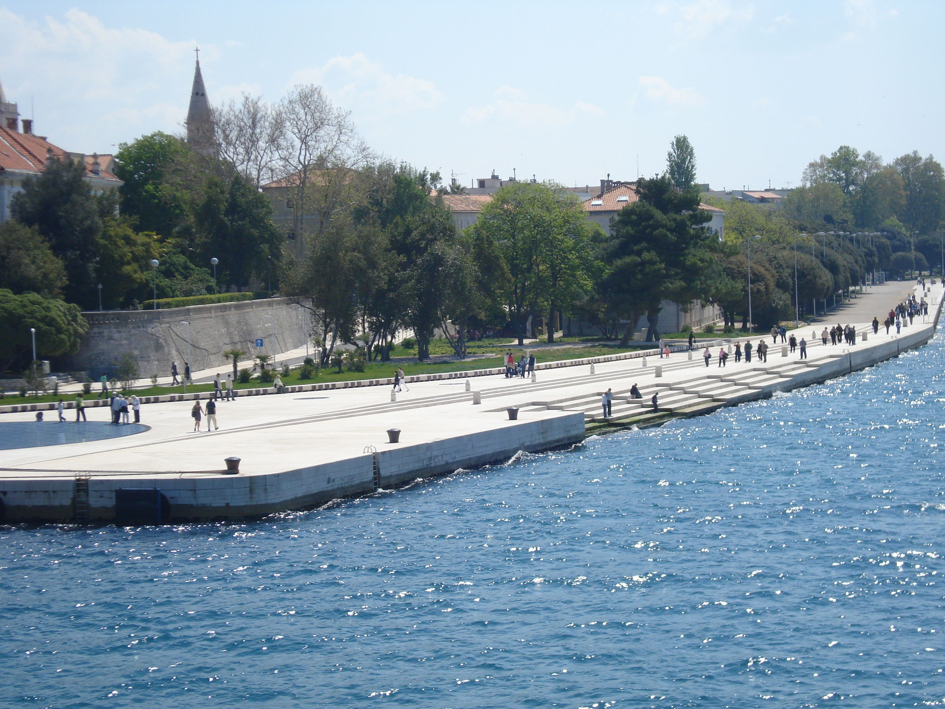 Sea organ in Zadar, Croatia